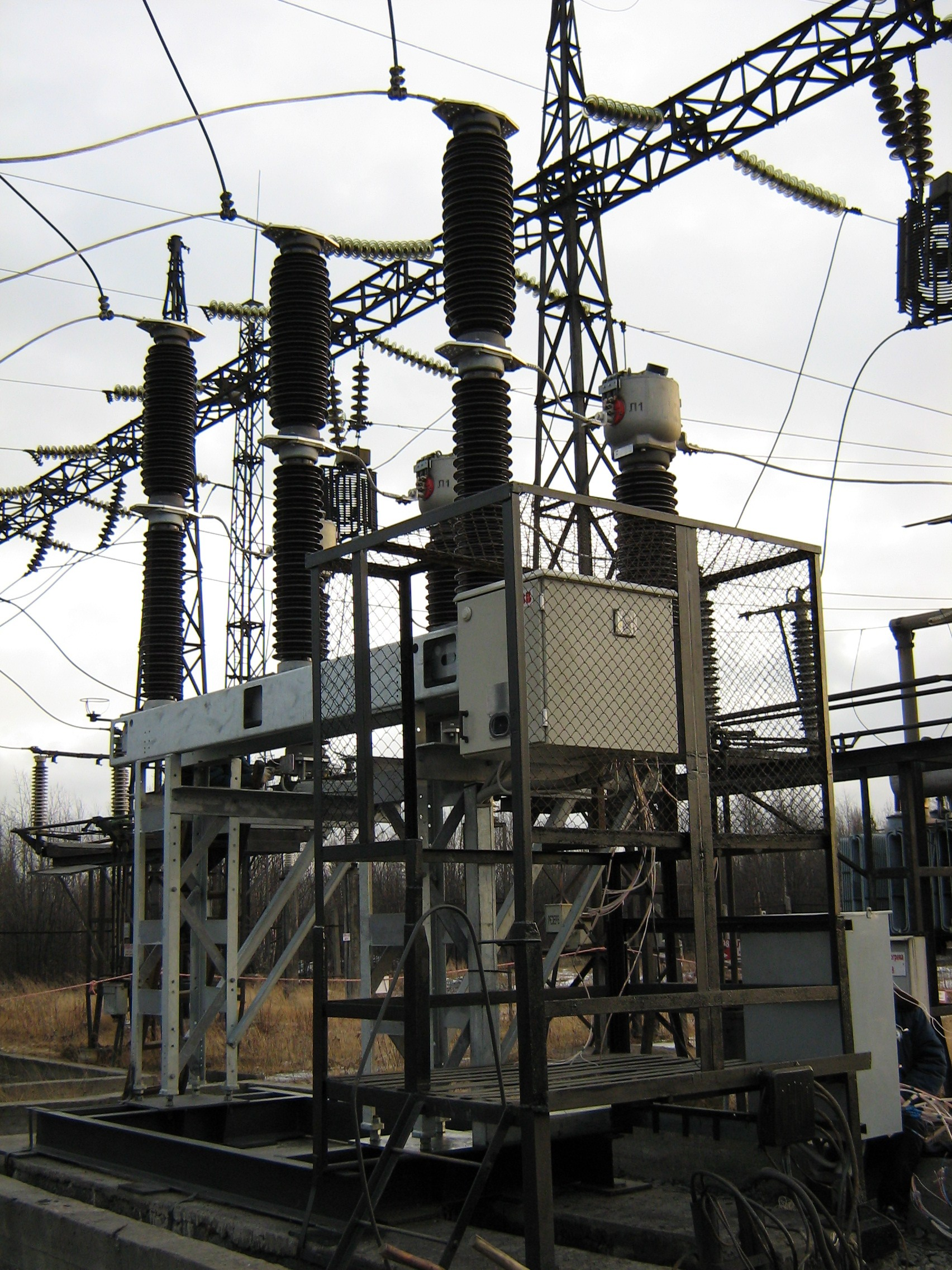 Маломасляный выключатель ВМТ-220